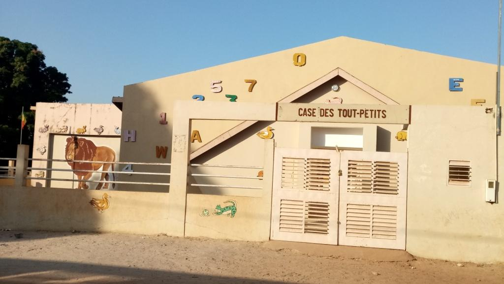 La Case des tout Petits de Goudomp est une structure scolaire d’encadrement de la petite enfance, sise au quartier Santassou